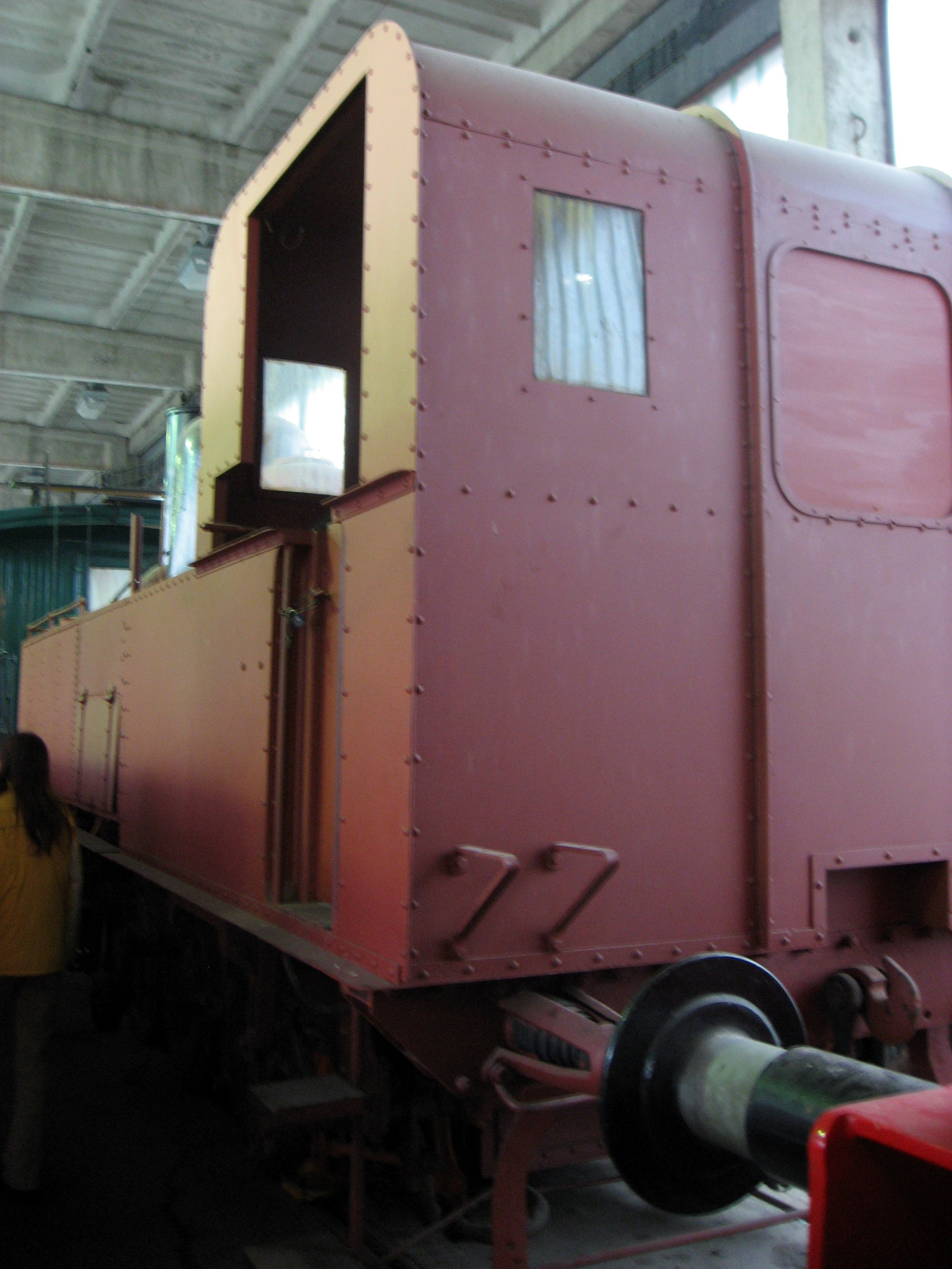 Lokomotiva Žerotín (400.901) z Místní dráhy Brno - Líšeň, Technické muzeum v Brně, depozitář MHD v Líšni